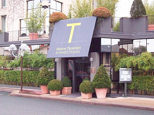 Restaurant Troisgros - 40 ans de Trois Etoiles